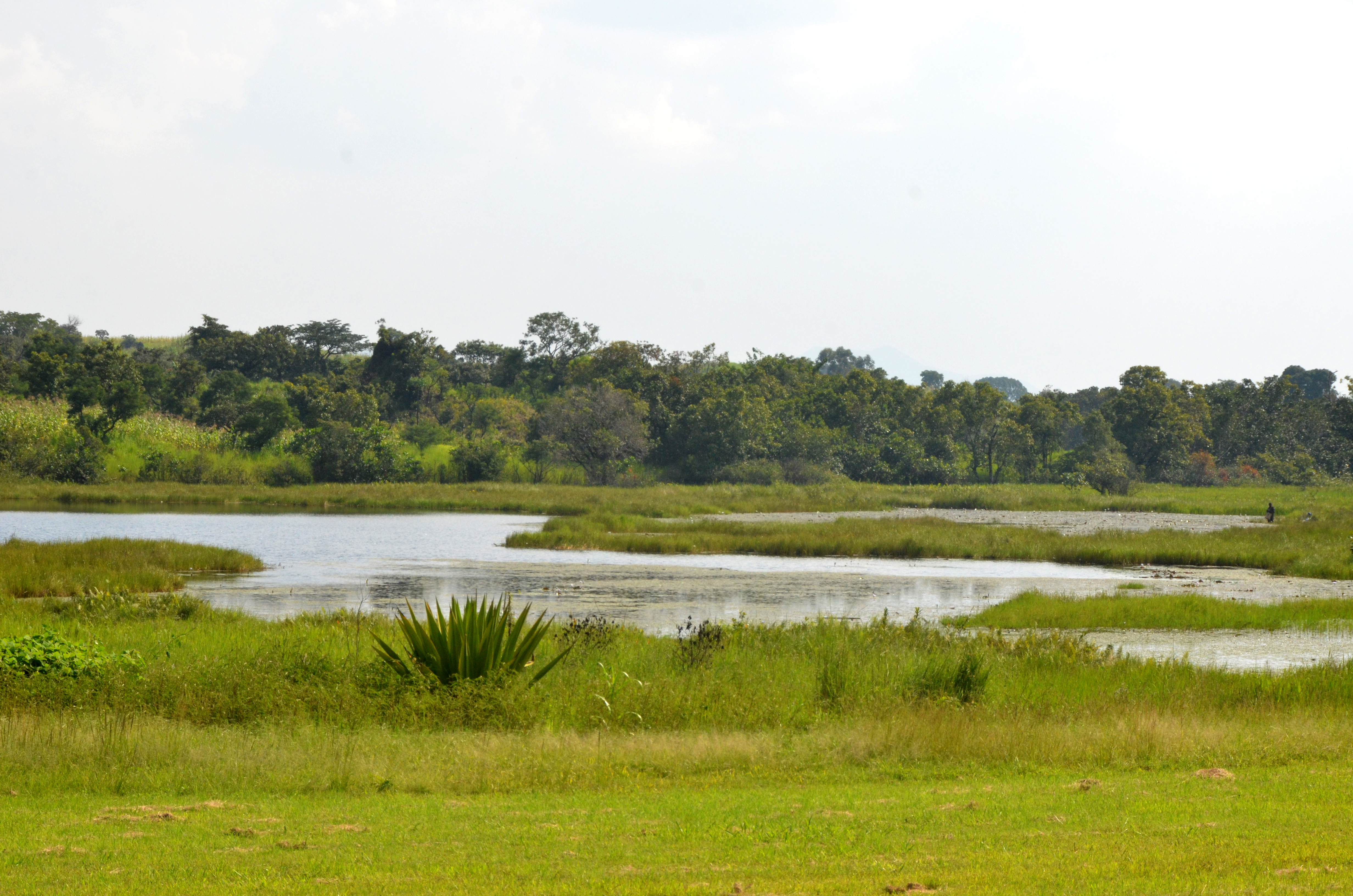 Le lac Petpenoun dans le Noun, dans la région de l'Ouest